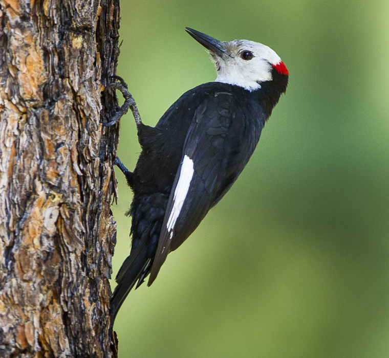 Picoides albolarvatus